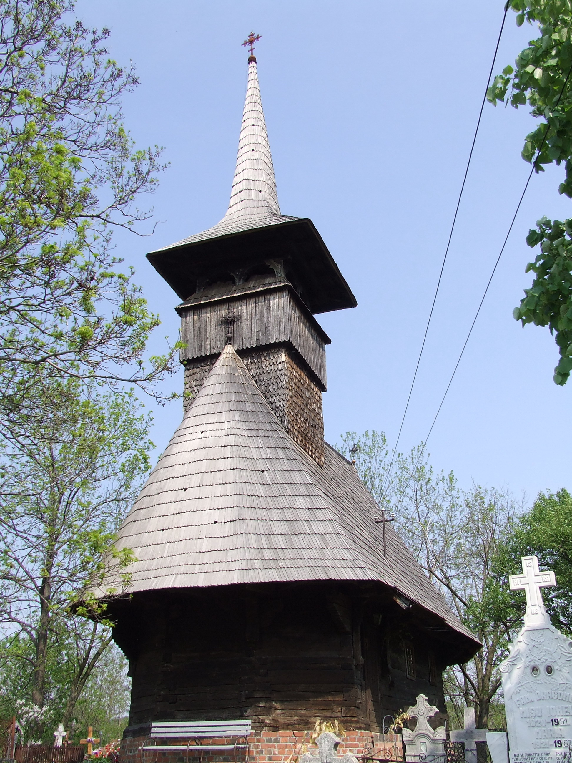 Biserica de lemn din Gâlgău, Sălaj mutată in Şueşti, Vâlcea. Autor: Bogdan Ilieş Data: mai 2007 Categorie:Biserici de lemn din Sălaj (imagini)